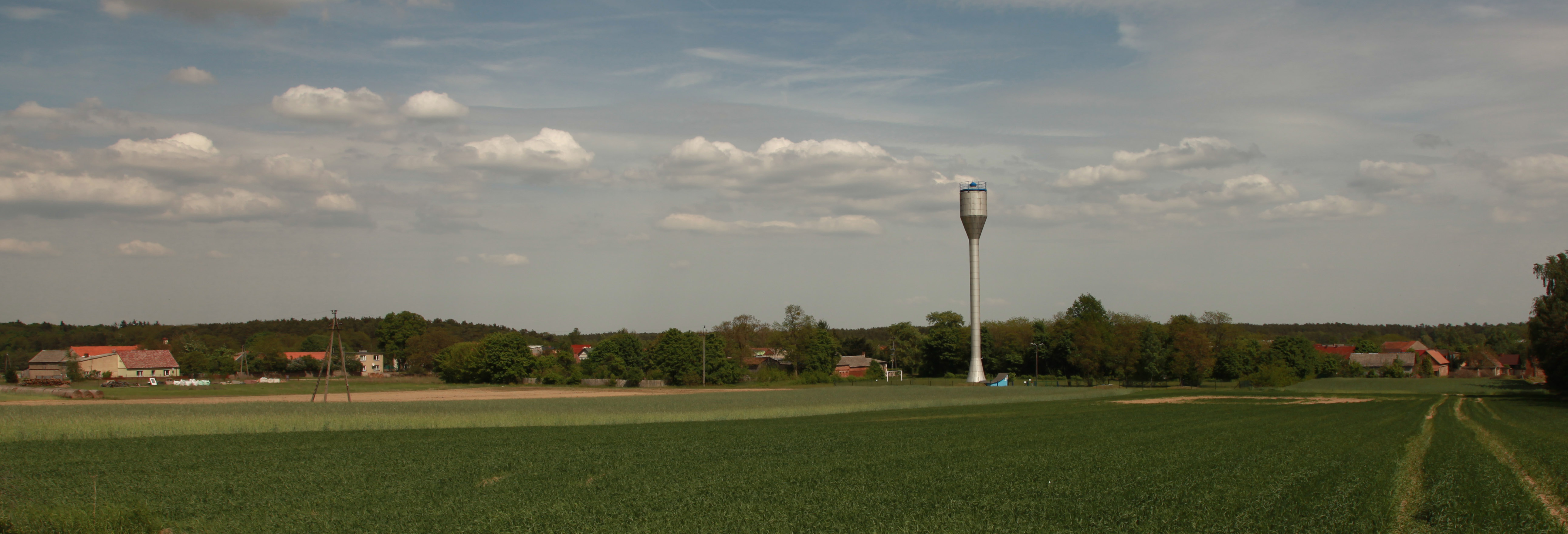 Nowa Wieś Zbąska - panorama